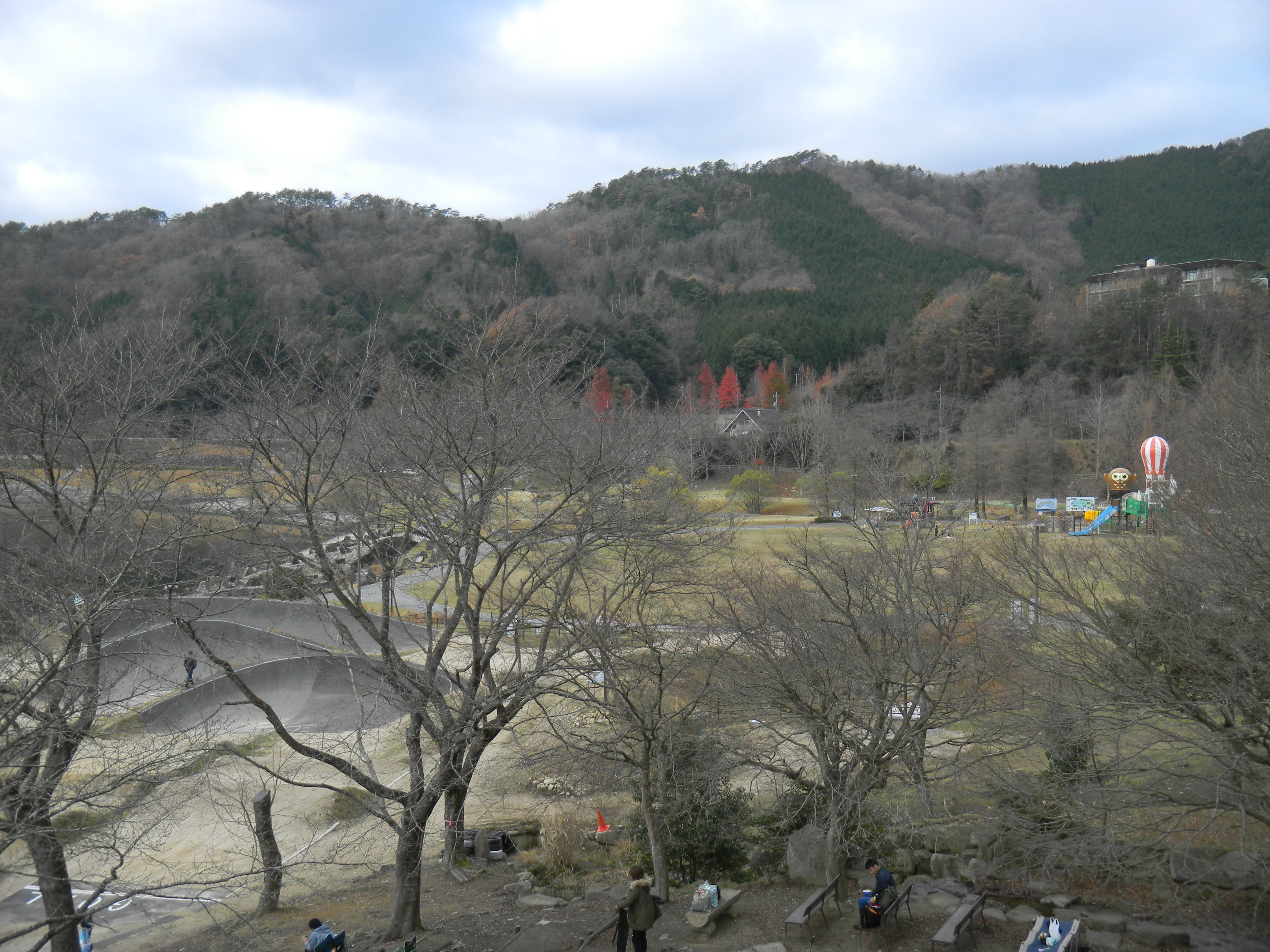 のどごえ公園(安芸高田市)